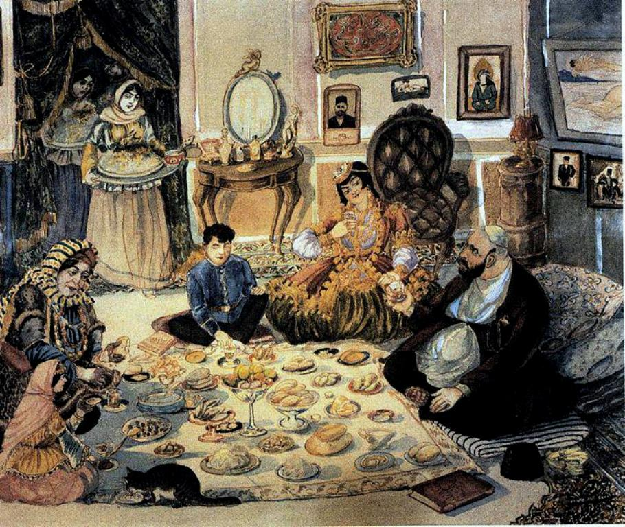 Əzim Əzimzadə - Varli evinde ramazan